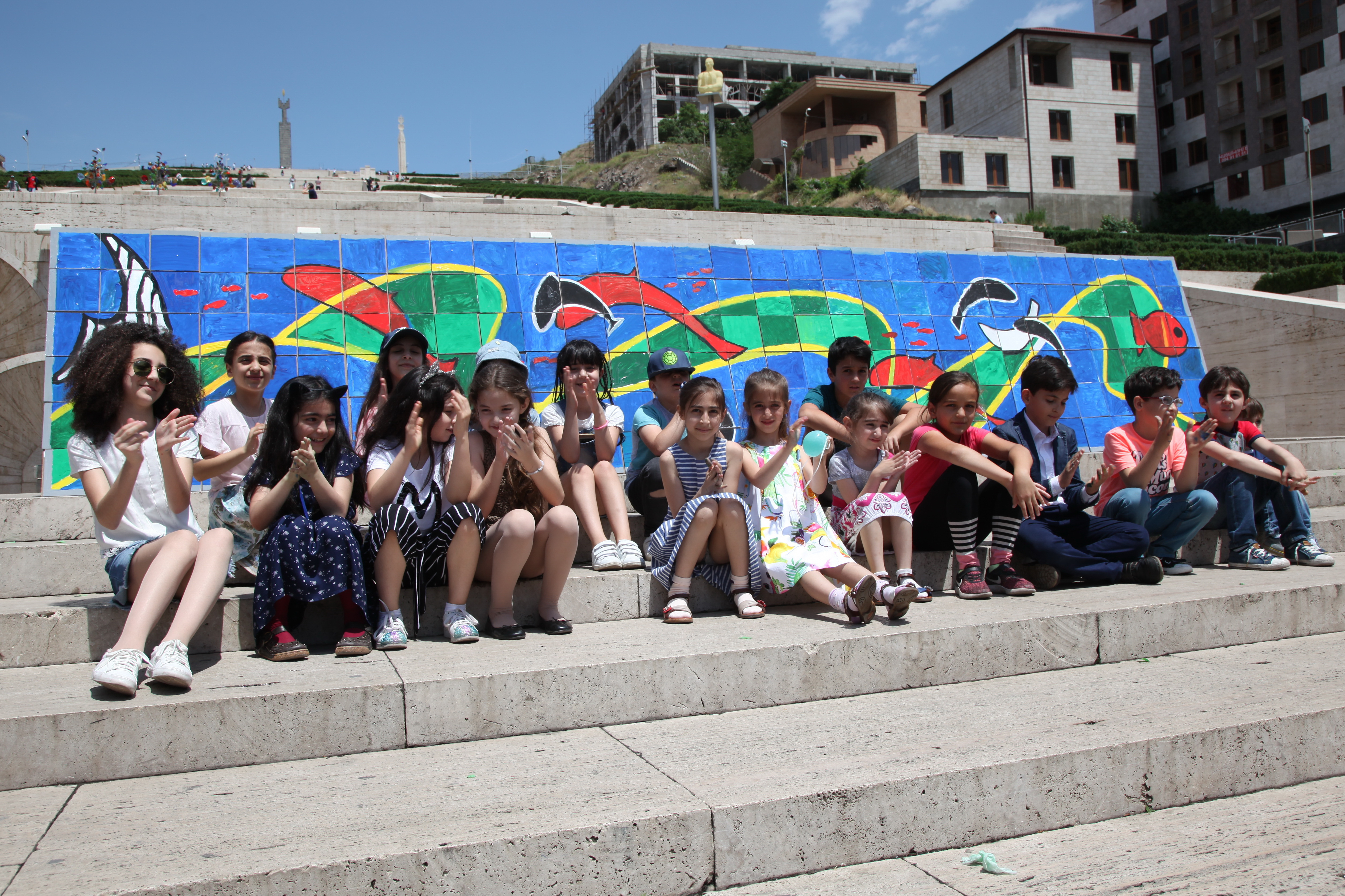 Երևանի Կասկադ համալիրի տեղում եղած ջրվեժի խճանկարի վերակազմություն-ինստալիացիան